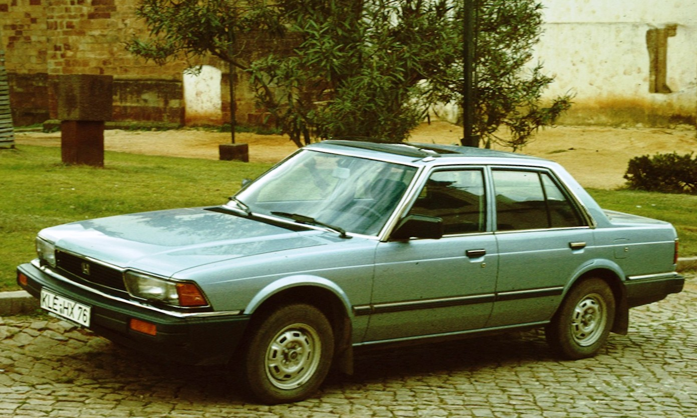 Honda Accord 4 door second generation